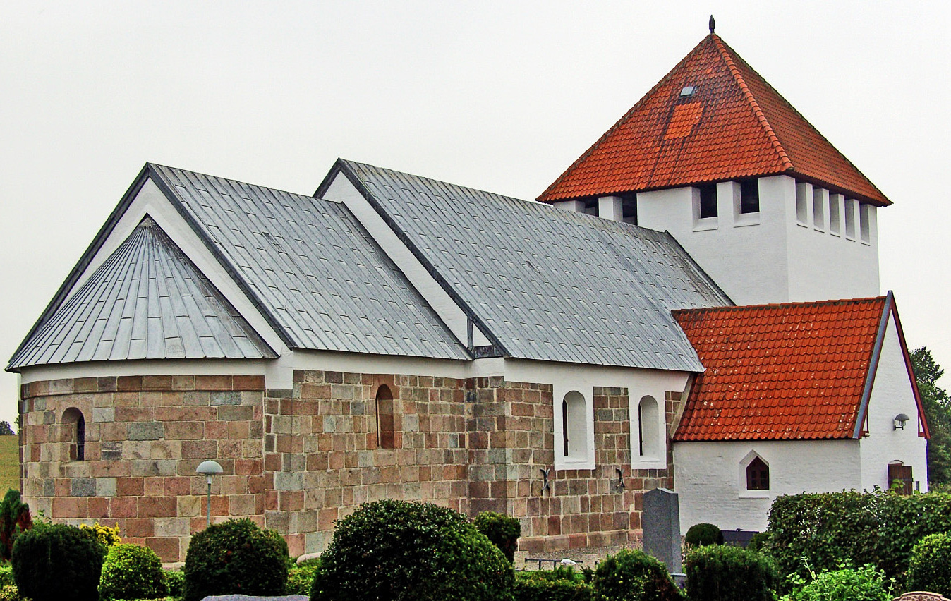 Hørdum kirke (Thisted) fra nordøst